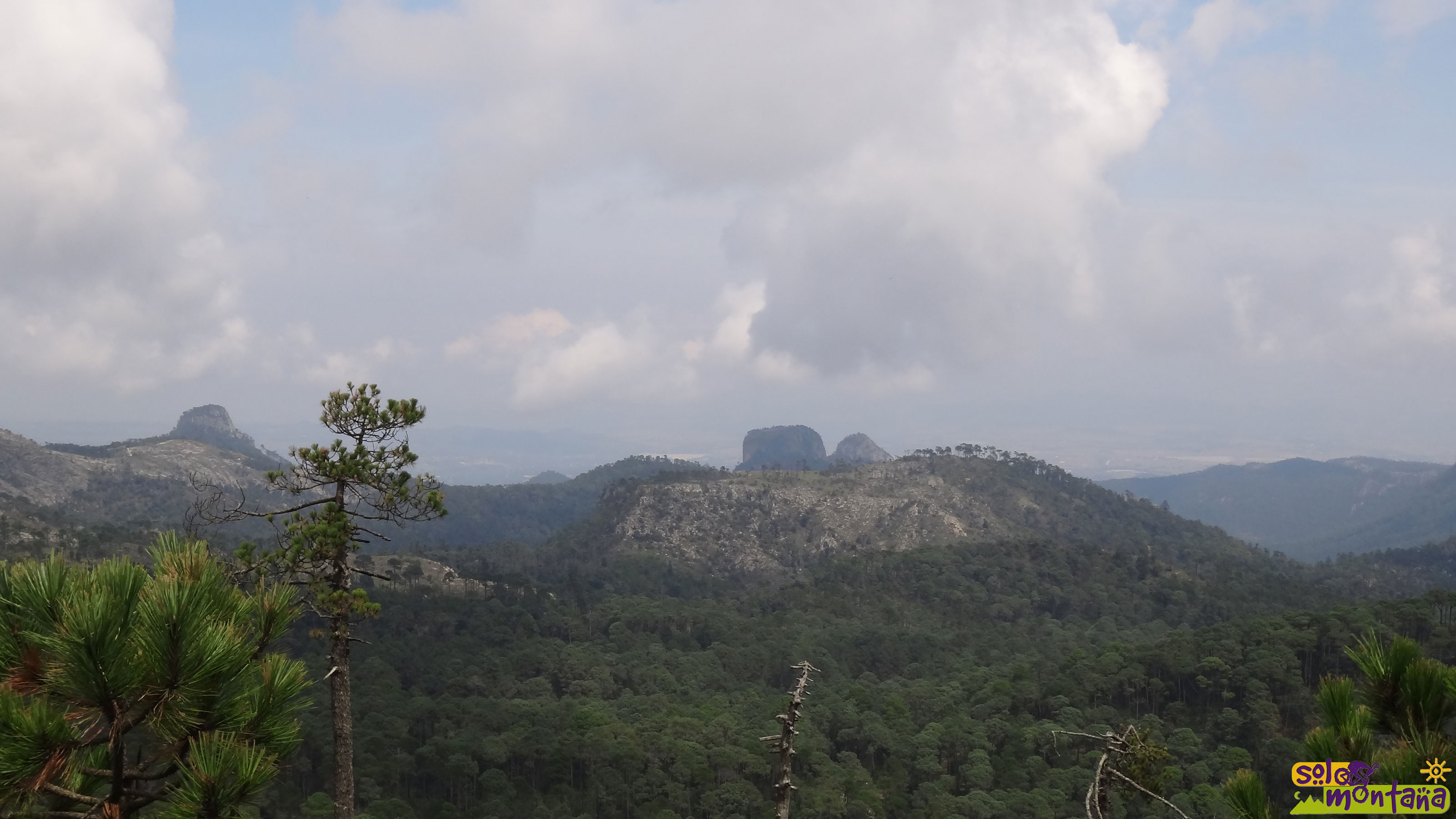 Sierra de las Navajas